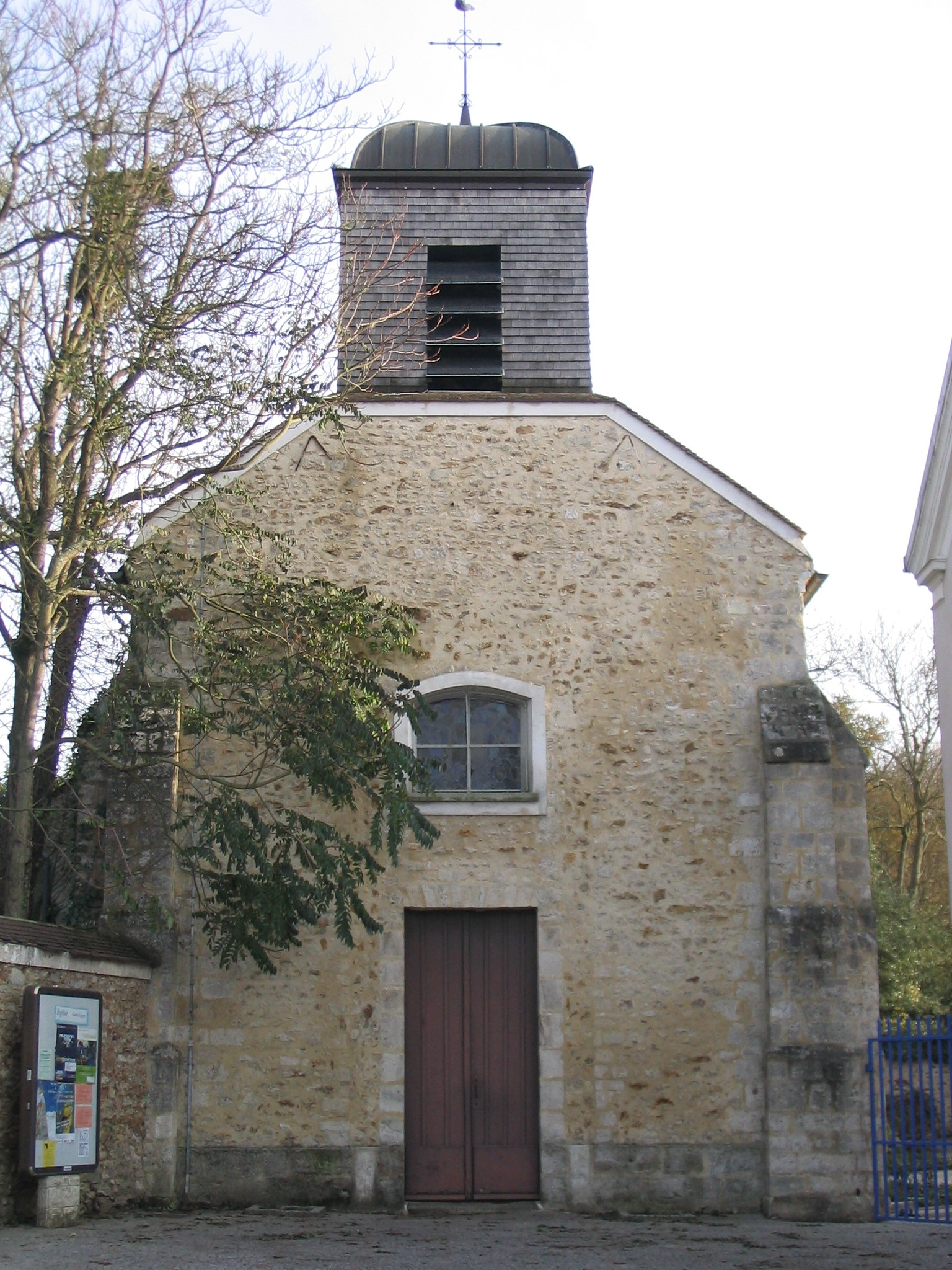 Facade de l'église de Nandy en Seine-et-Marne.